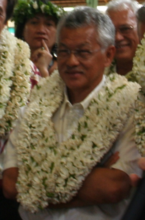 Gaston Tong Sang, président de la Polynésie Française, au marché de Papeete